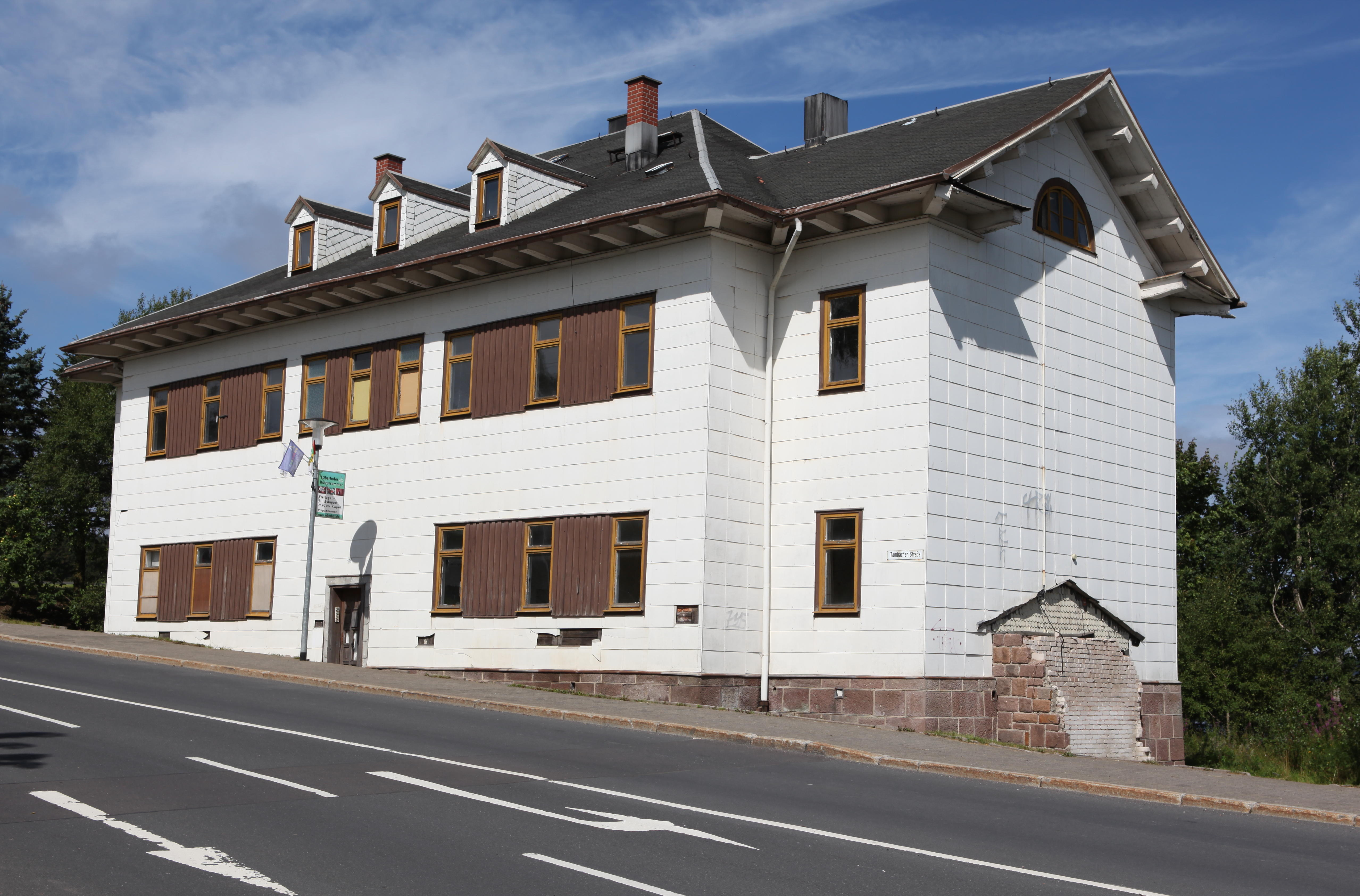 Ehemaliges Jagdschloss von 1830 in Oberhof